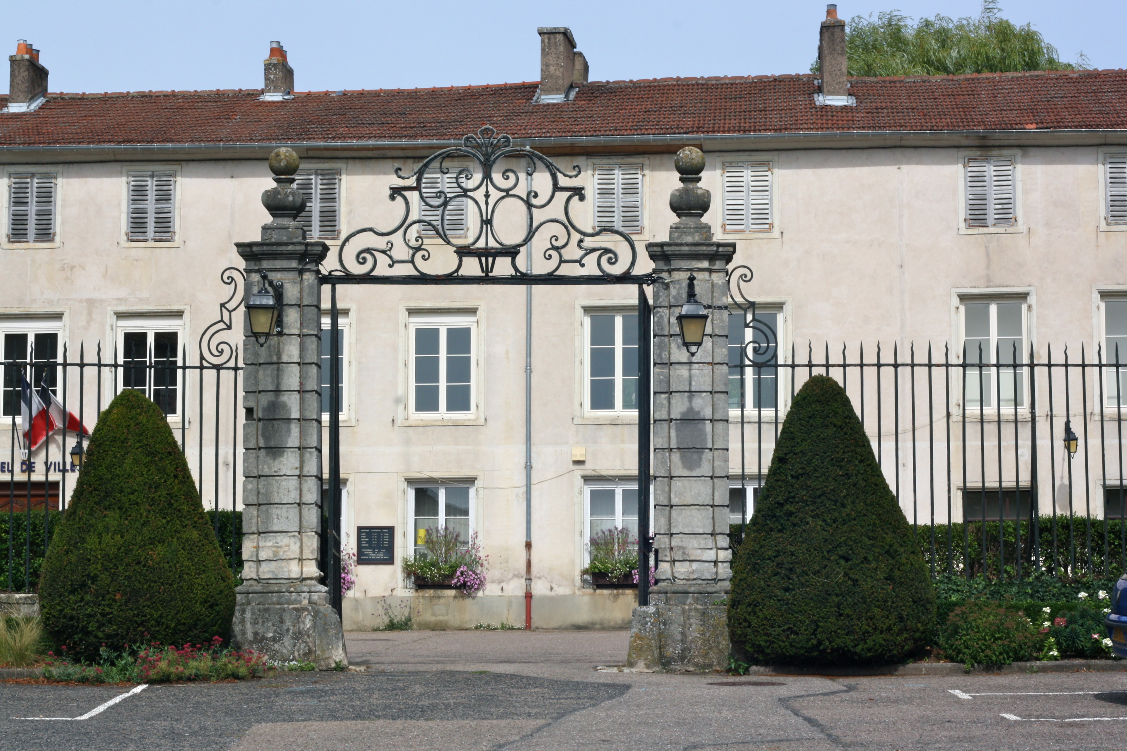 mairie de Lay-Saint-Christophe